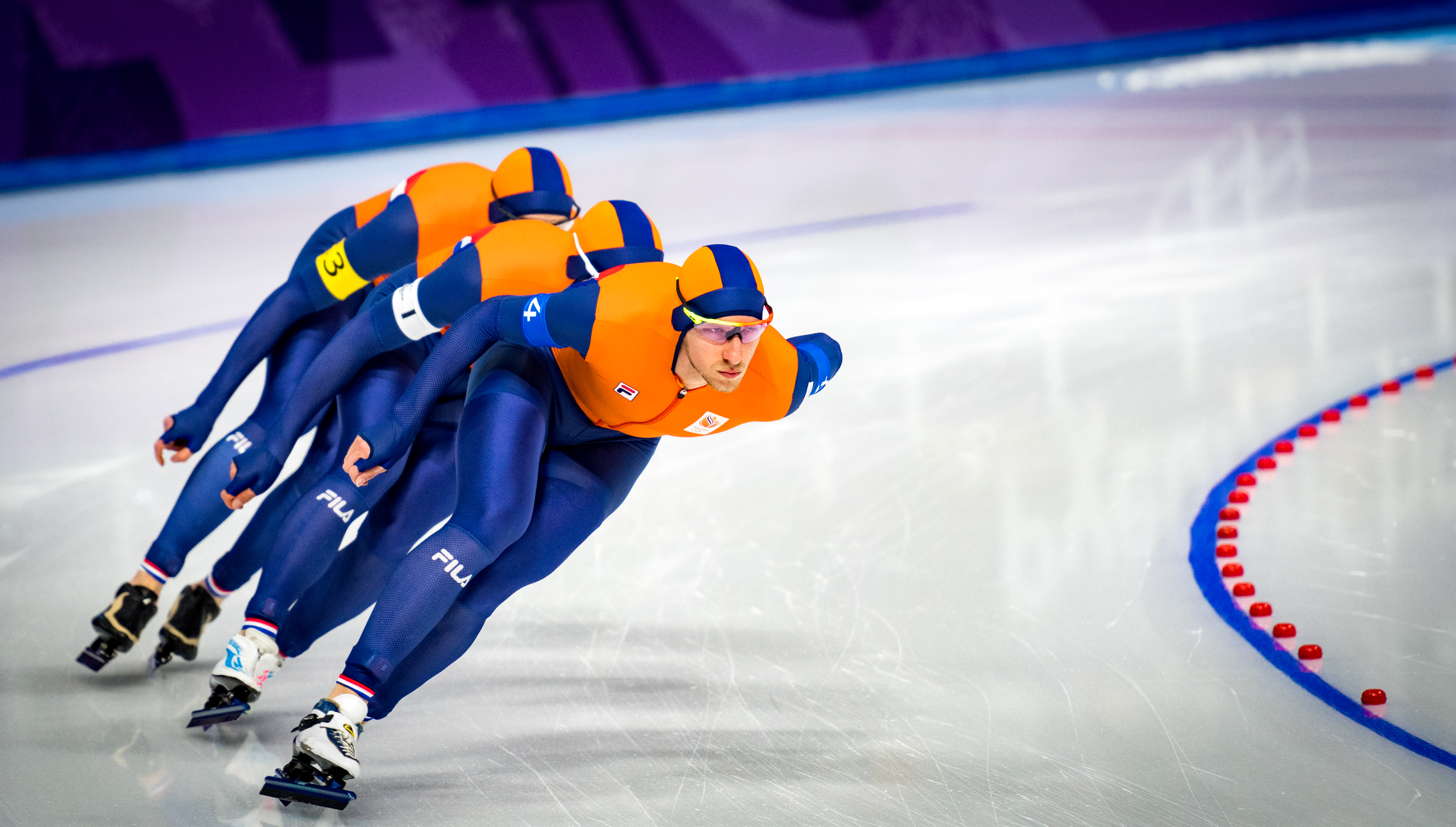 _DSC5153